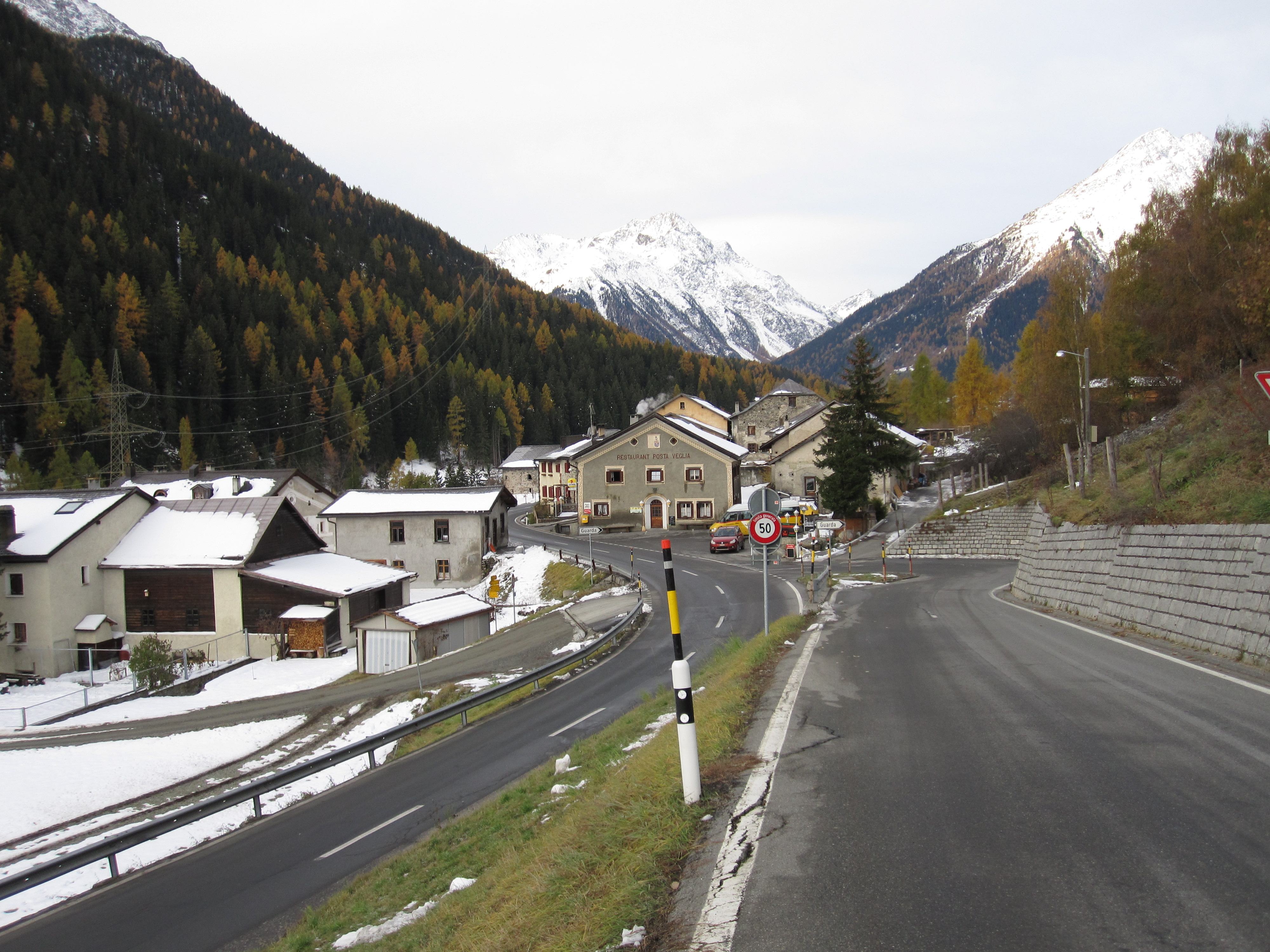 Giarsun im Unterengadin (Kanton Graubünden), politisch zu Guarda gehörig